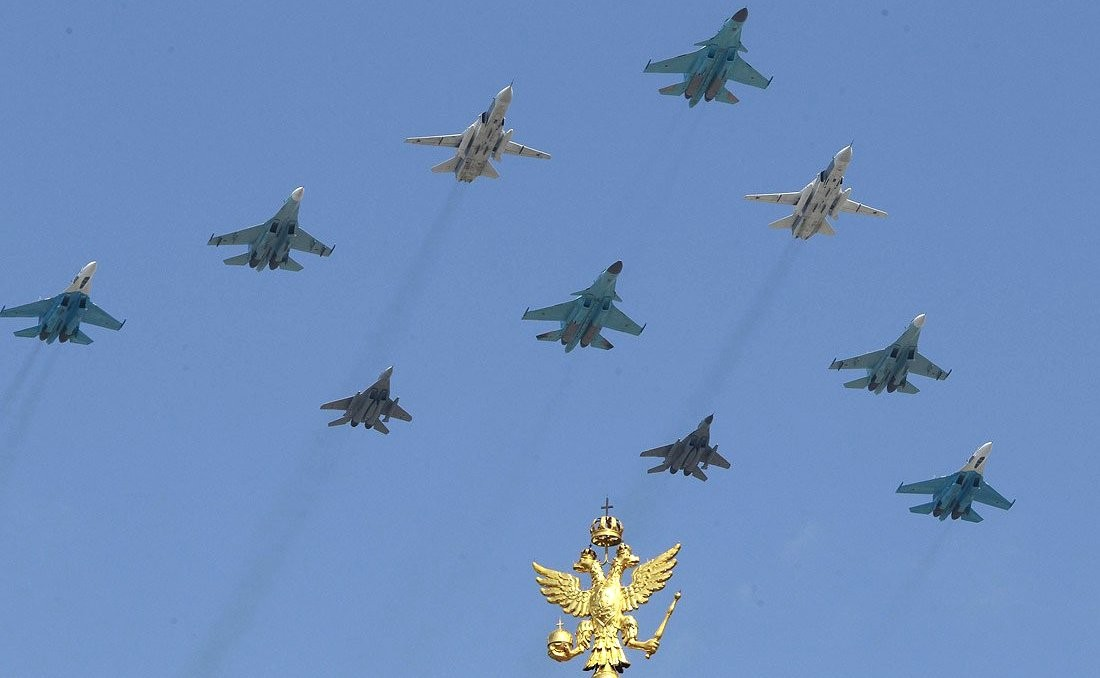 Военный парад, посвящённый 65-летию Победы в Великой Отечественной войне.